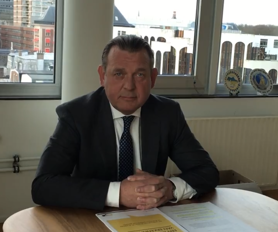 Reinier van Zutphen